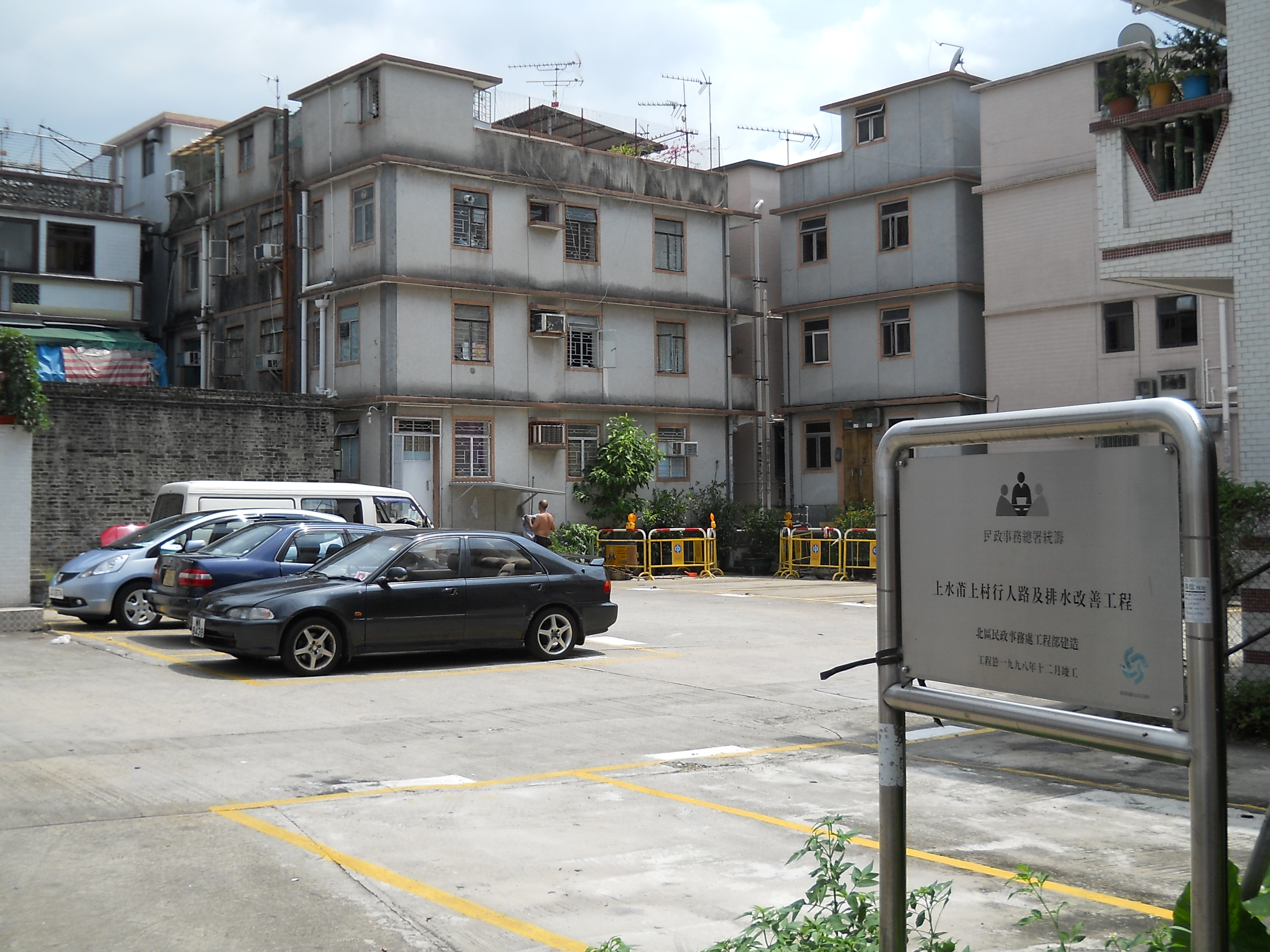 中文（香港）: 上水圍莆上村